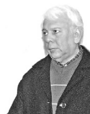 Rubén Alberto Gómez en el juicio en el que se lo declaró culpable de crímenes de lesa humanidad (en 2009). Rubén Alberto Gómez (Los Tábanos, localidad rural del norte de la provincia de Santa Fe, 16 de mayo de 1950) es un delincuente y exmilitar argentino. Resultó ser culpable, junto a su cómplice José María Cuenca, de crímenes de lesa humanidad por lo que fue condenado a prisión perpetua y a destitución de su grado militar del Servicio Penitenciario Federal. Durante la dictadura cívico-militar autodenominada Proceso de Reorganización Nacional (1976-1983) tuvo bajo su dirección ―junto a José María Cuenca― uno de los centros clandestinos de detención (CCD) ubicado en la Unidad Penal 17, con asiento en Candelaria (en la provincia de Misiones).